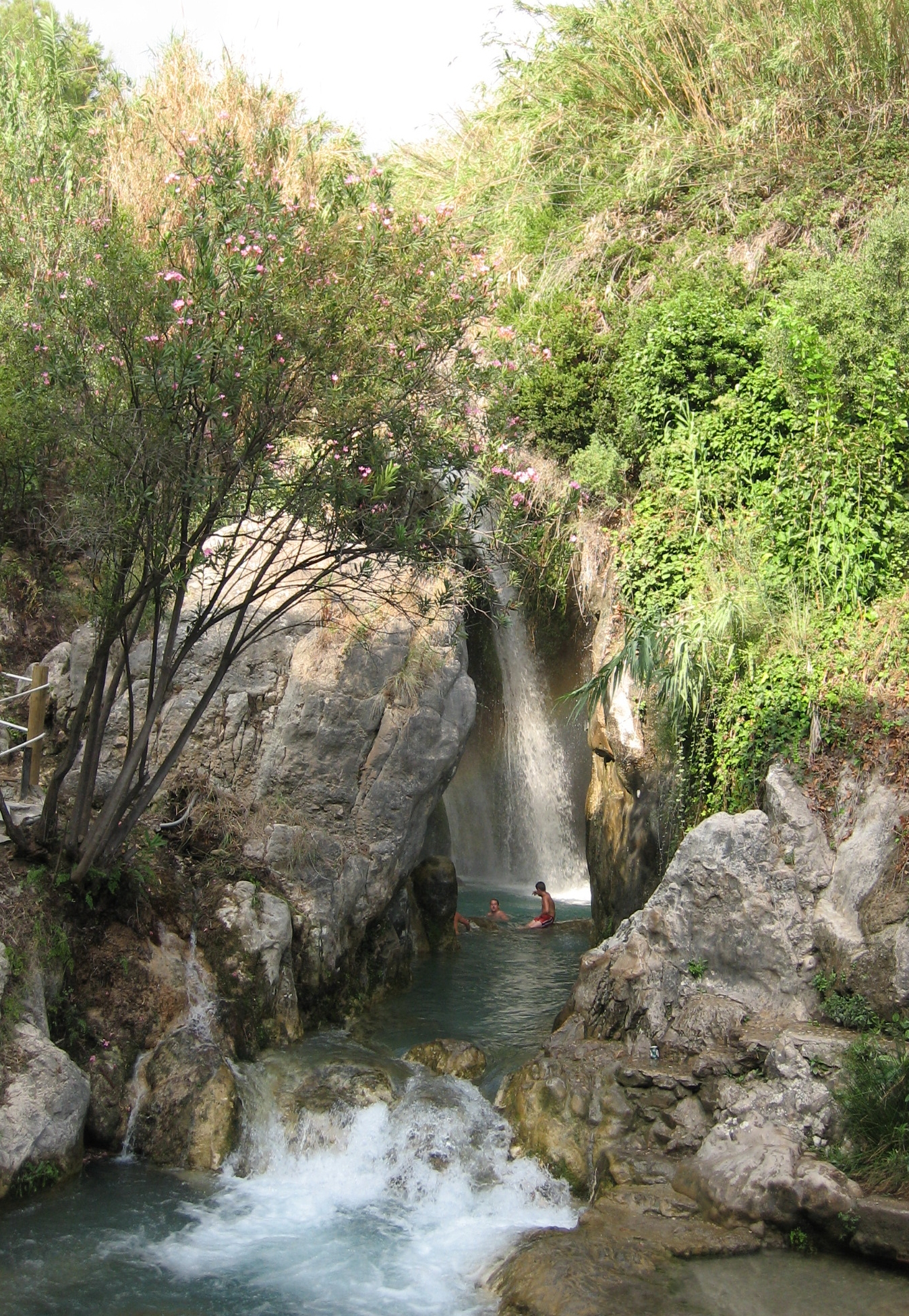 Cascada de las Fuentes del Algar, espacio recreativo situado en el nacimiento del río Algar, que presenta numerosos saltos de agua. Se encuentran en el término de Callosa de Ensarriá, en la provincia de Alicante (España).